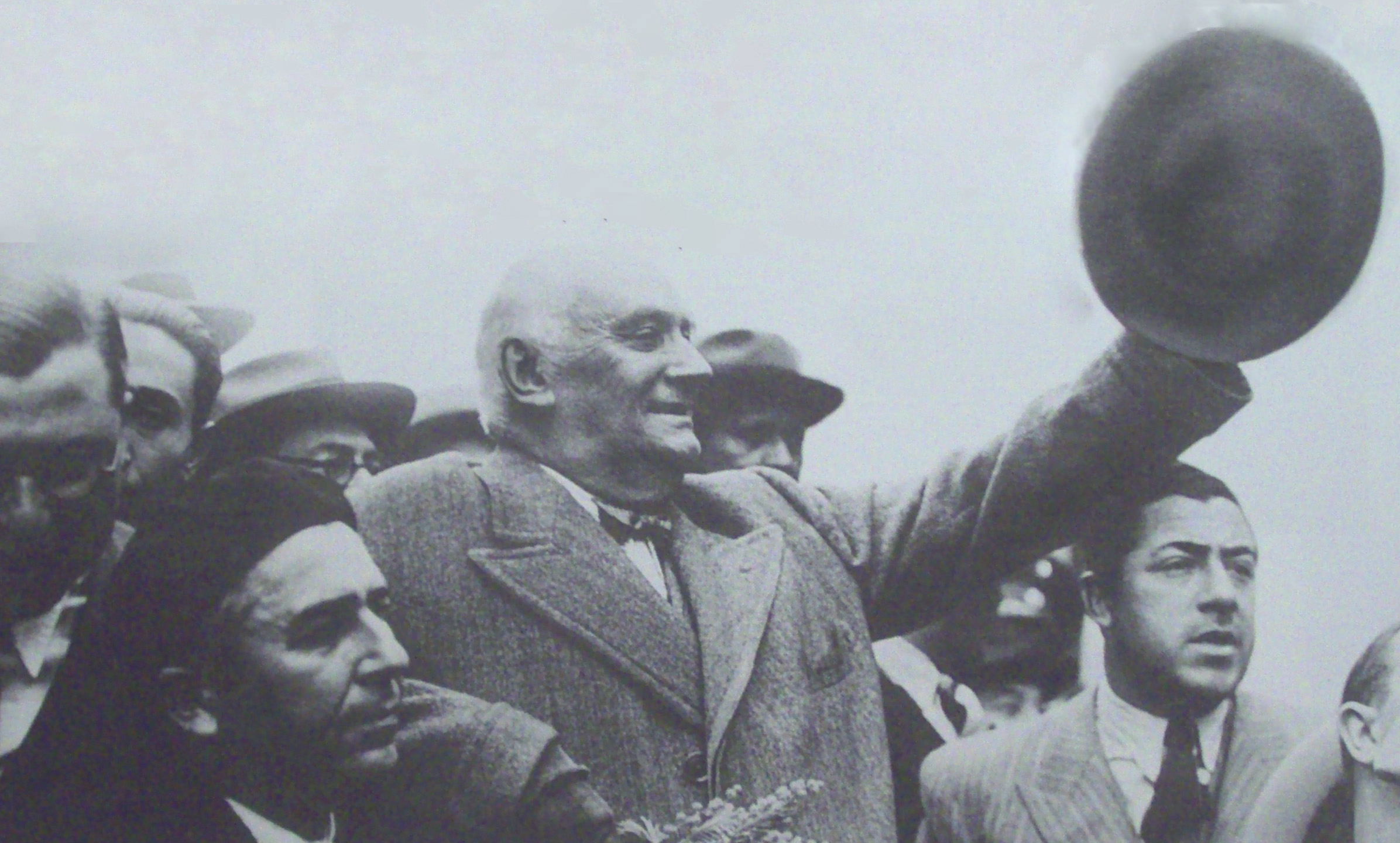 Es una foto del ex presidente argentino Marcelo T. de Alvear, haciendo campaña en 1938.